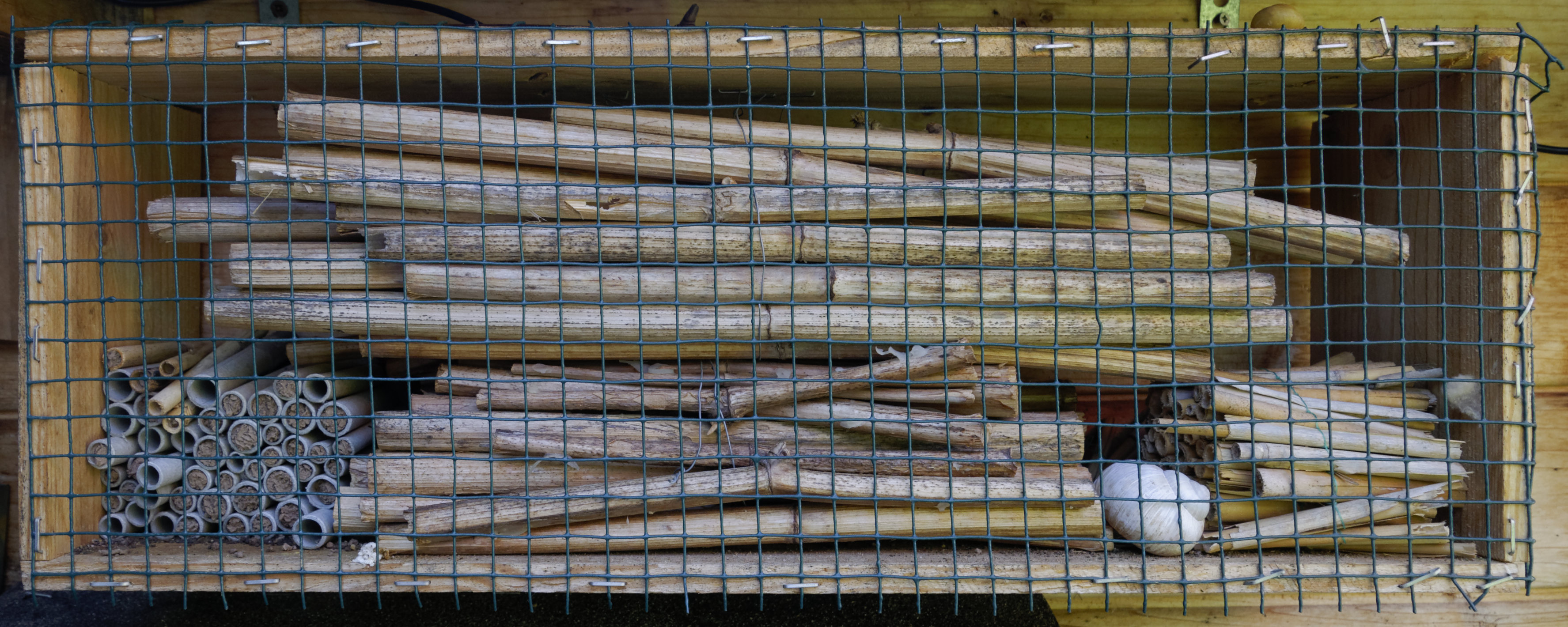 ein selbstgebute gegen Vögel gesicherte Nisthilfe mit japansichem Knöterich, Schilf und Pappröhrchen